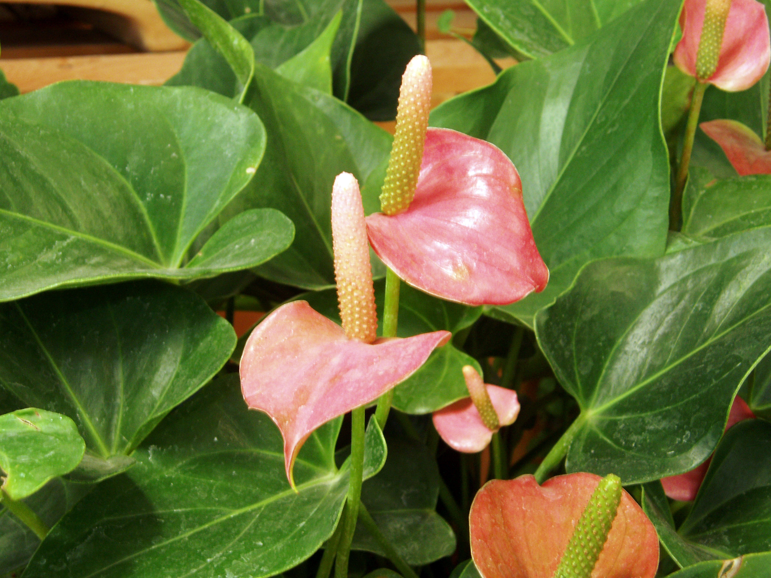 Flamingo lilies